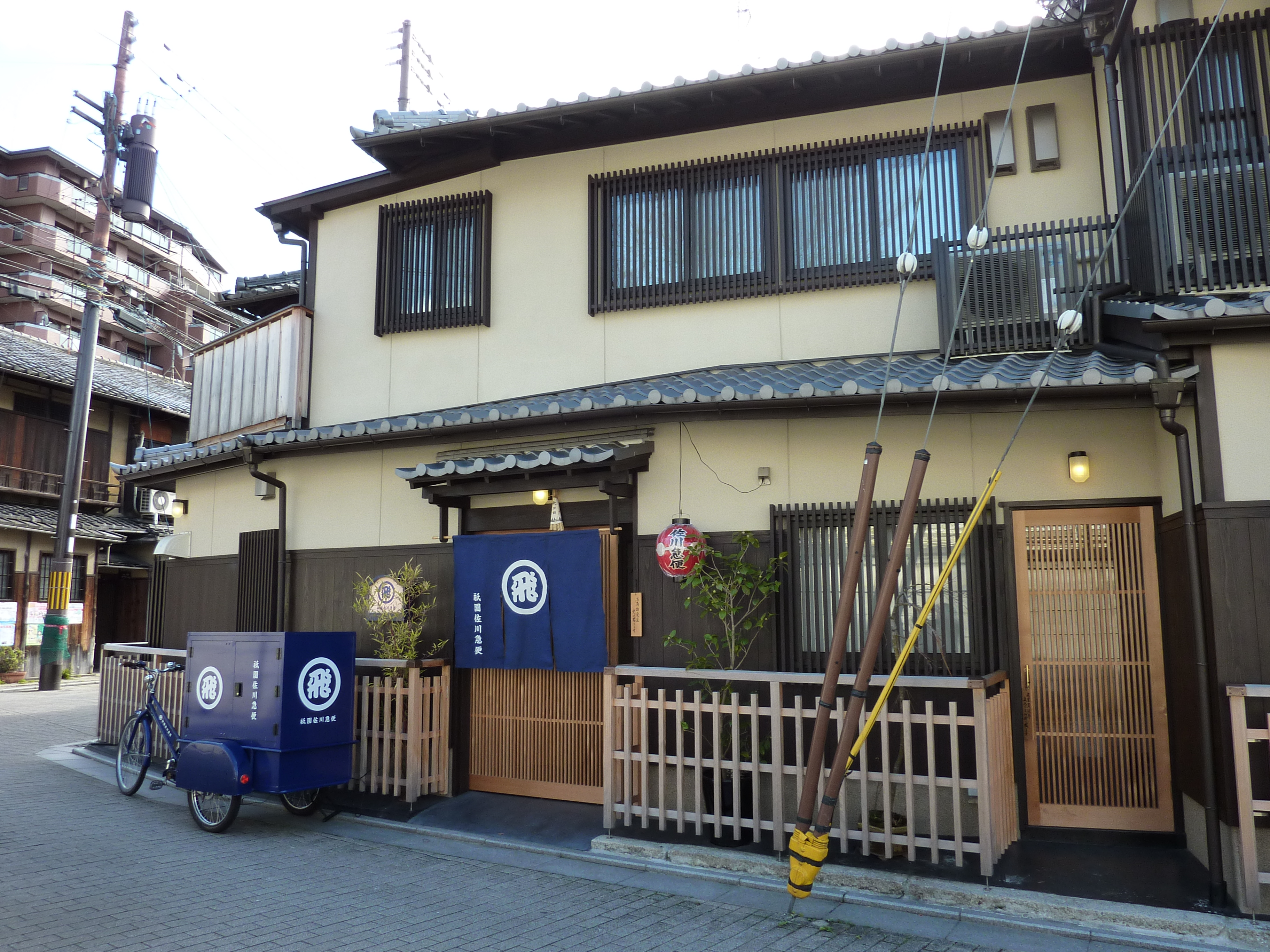 祇園佐川急便